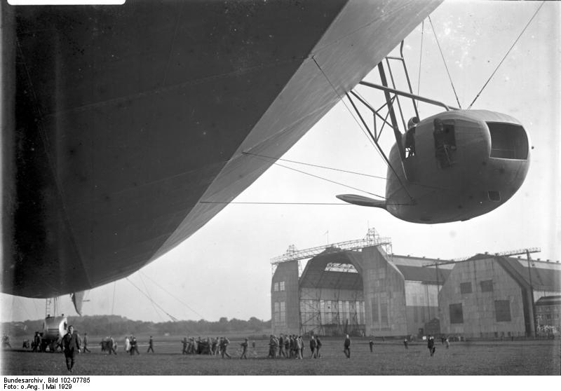 Zu der Notlandung des "Graf Zeppelin" auf seiner Amerikafahrt in Toulon/Frankreich! Der hintere und rechte Seitenmotor des "Graf Zeppelin" welche bei der Unglücksfahrt zuerst aussetzten und das Schiff zur Notlandung zwangen.